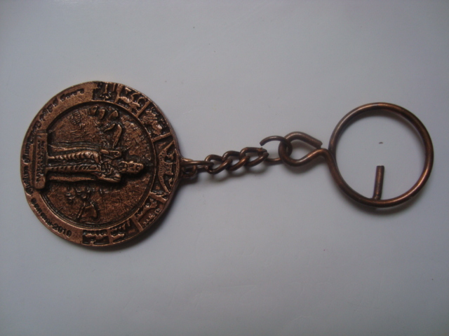 செம்மொழி மாநாட்டில் கலந்து கொண்ட கட்டுரையாளர்களுக்கு வழங்கப்பட்ட அன்பளிப்புப் பொருள்களில் ஒன்று.Unknown this key chain presented at tamil classical conference, 2010